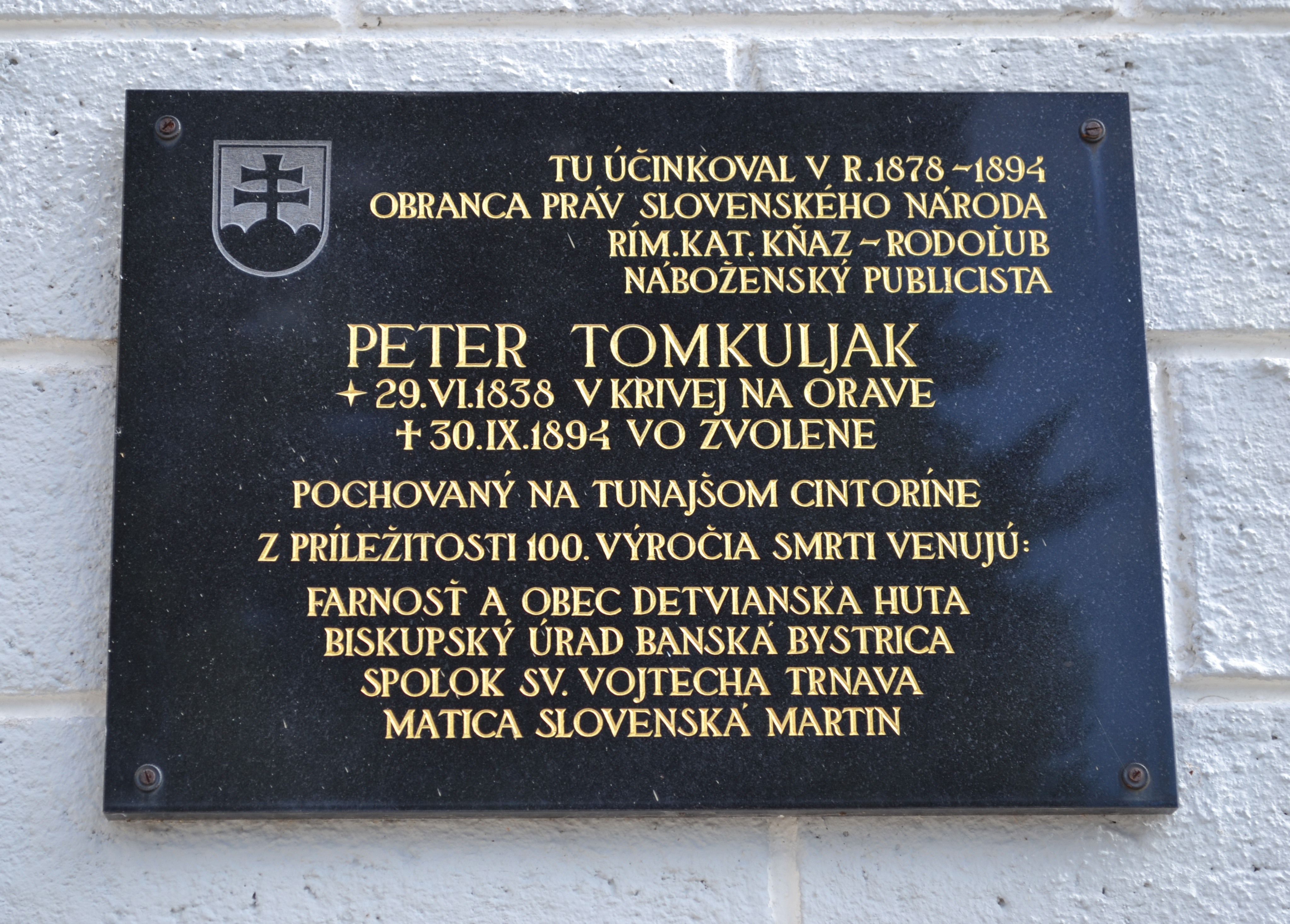 Pamätná tabuľa slovenskeho rímskokatolíckého kňaza Petra Tomkuliaka na stene kostola Nanebovzatia panny Márie v Detvianskej Hute